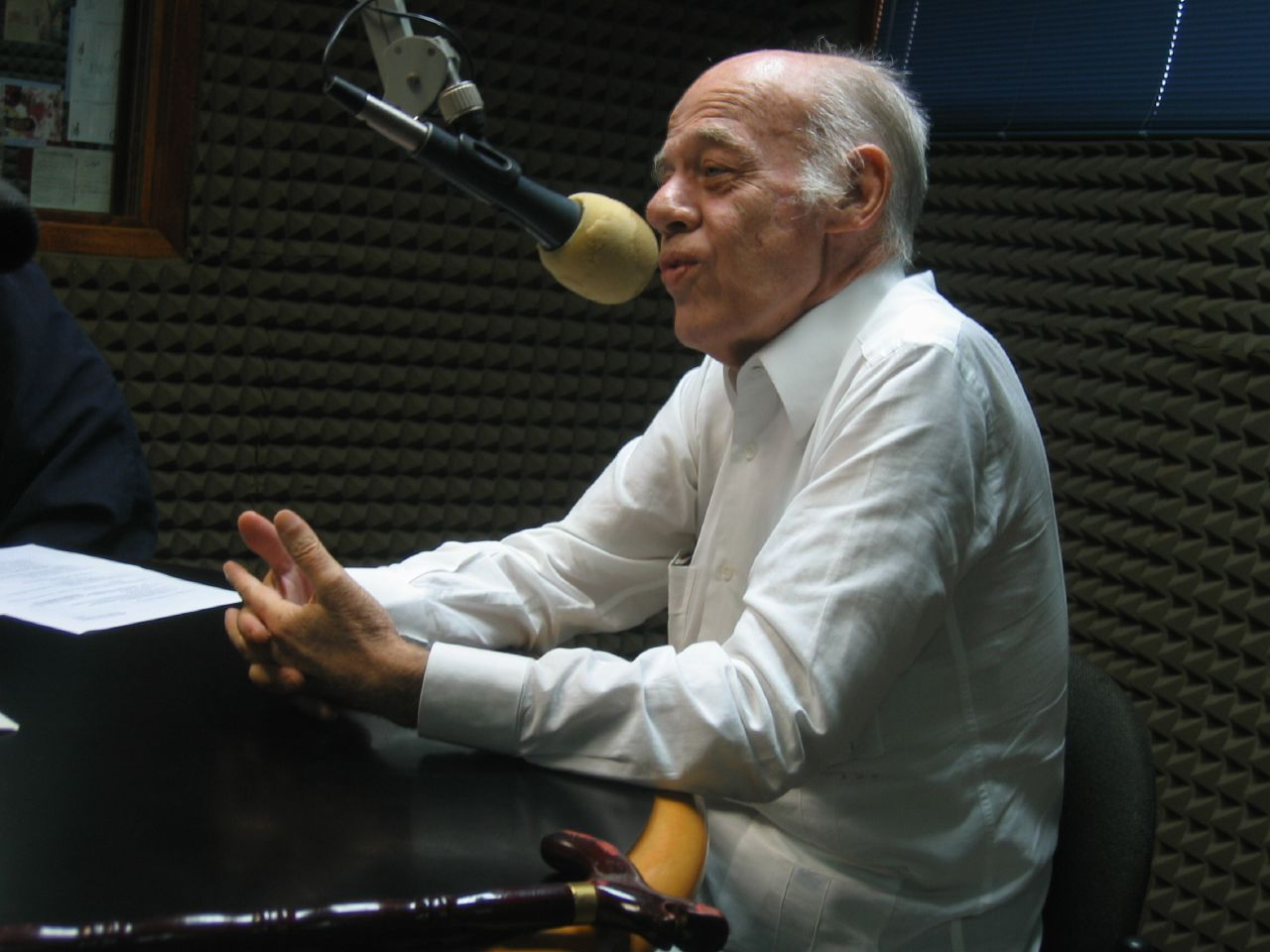 General Alberto Müller Rojas. Venezolano.